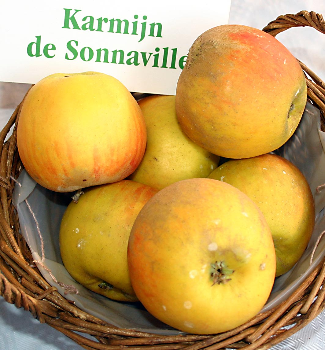 Malus "Karmijn de Sonnaville", Büdingen